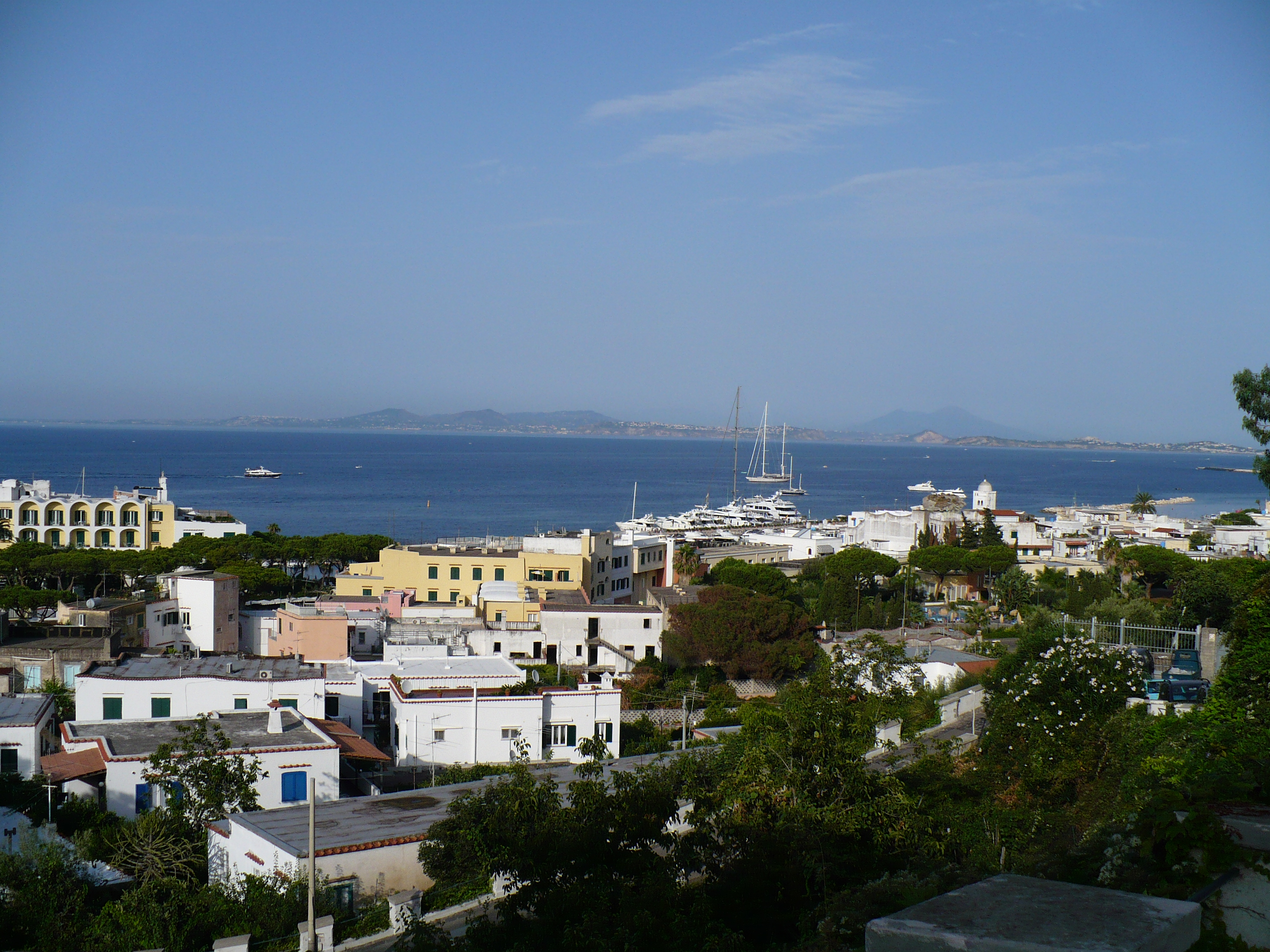 veduta di Lacco Ameno dal Museo archeologico di Pithecusae, sito nel complesso di Villa Arbusto Autore foto:Roberto De Martino